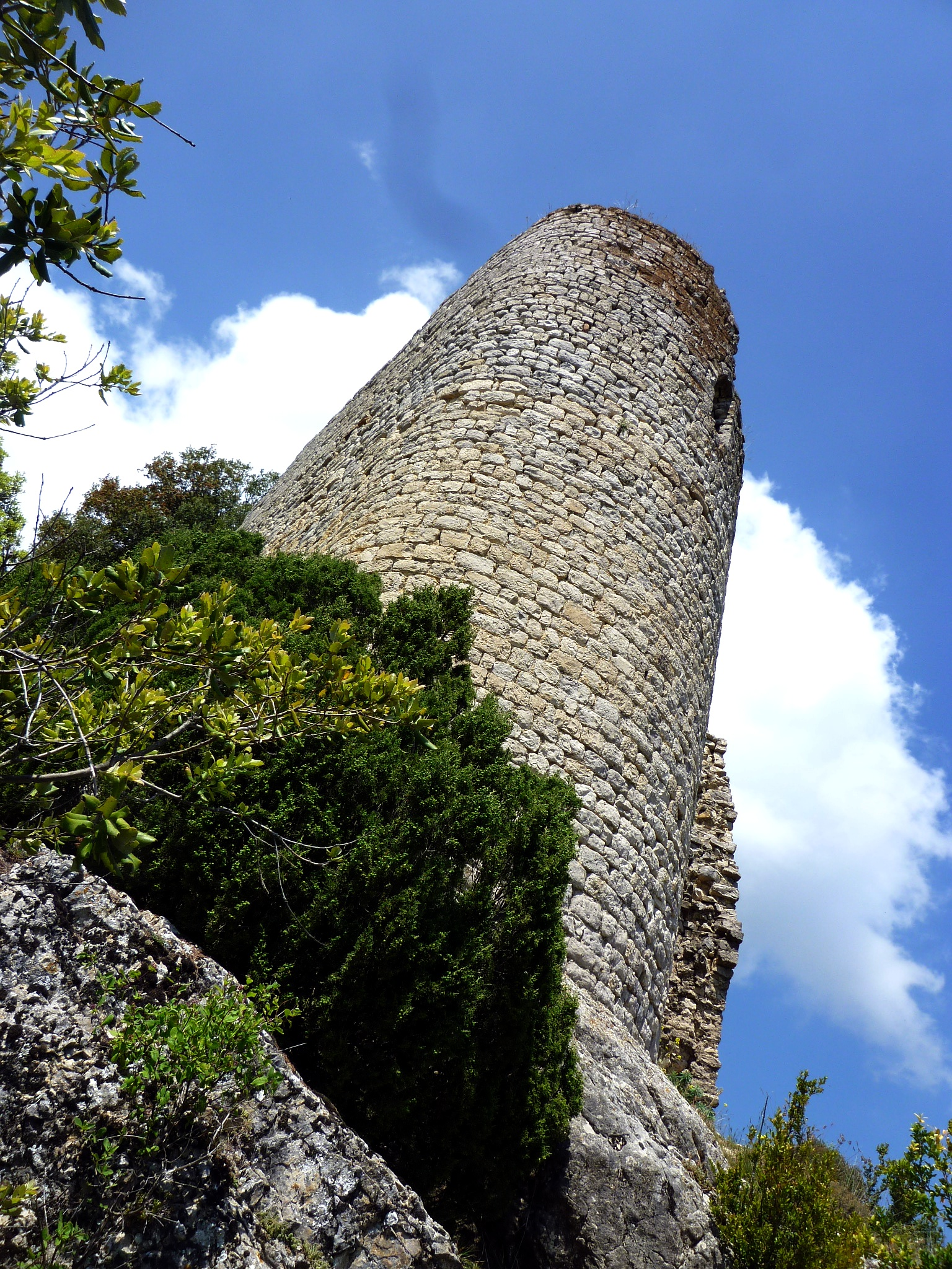 Castelló de Meià (Artesa de Segre)